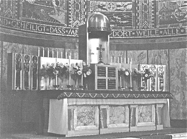 Altar der Kirche Herz Jesu in Aachen - Burtscheid